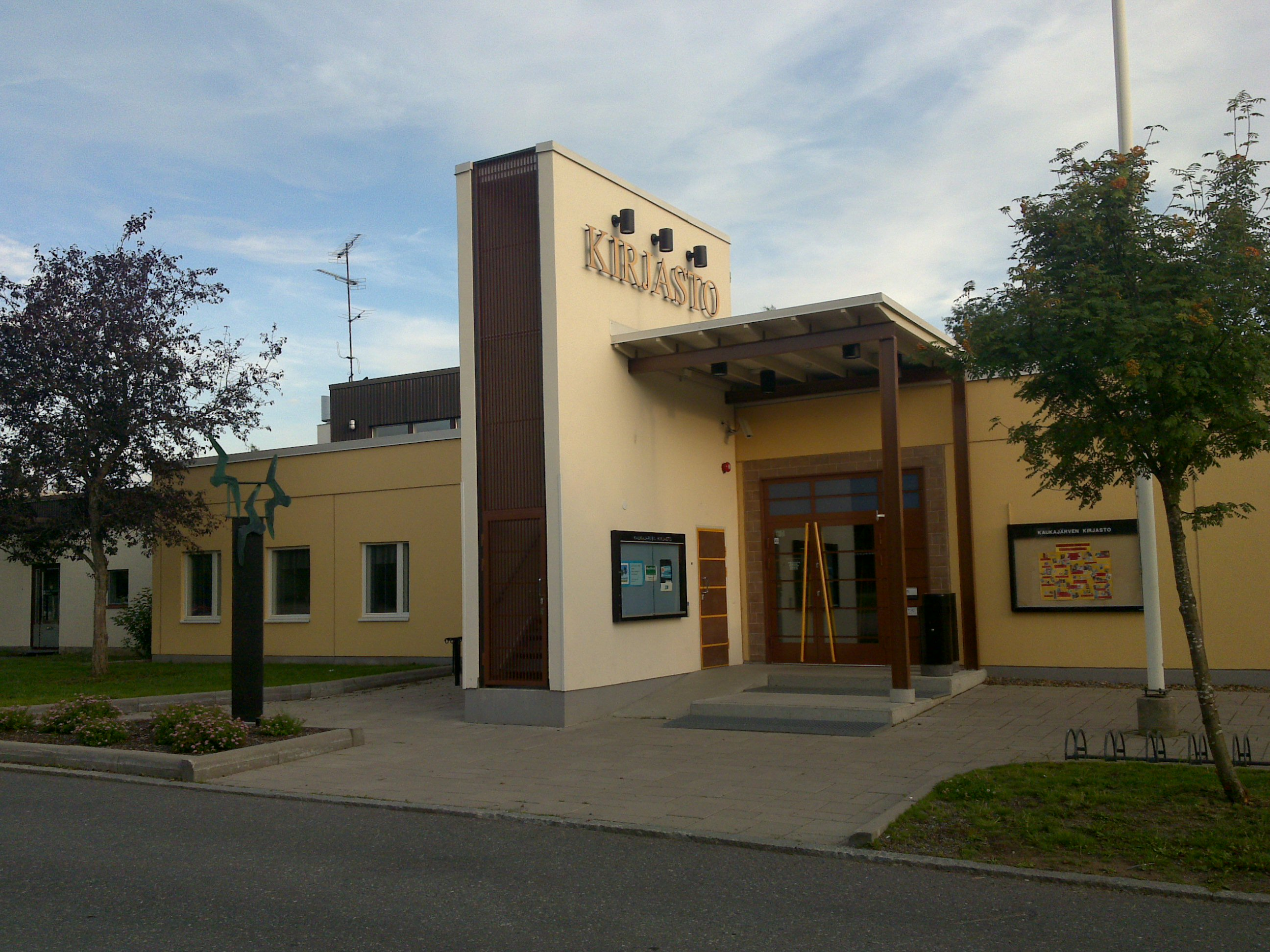 Kirjasto